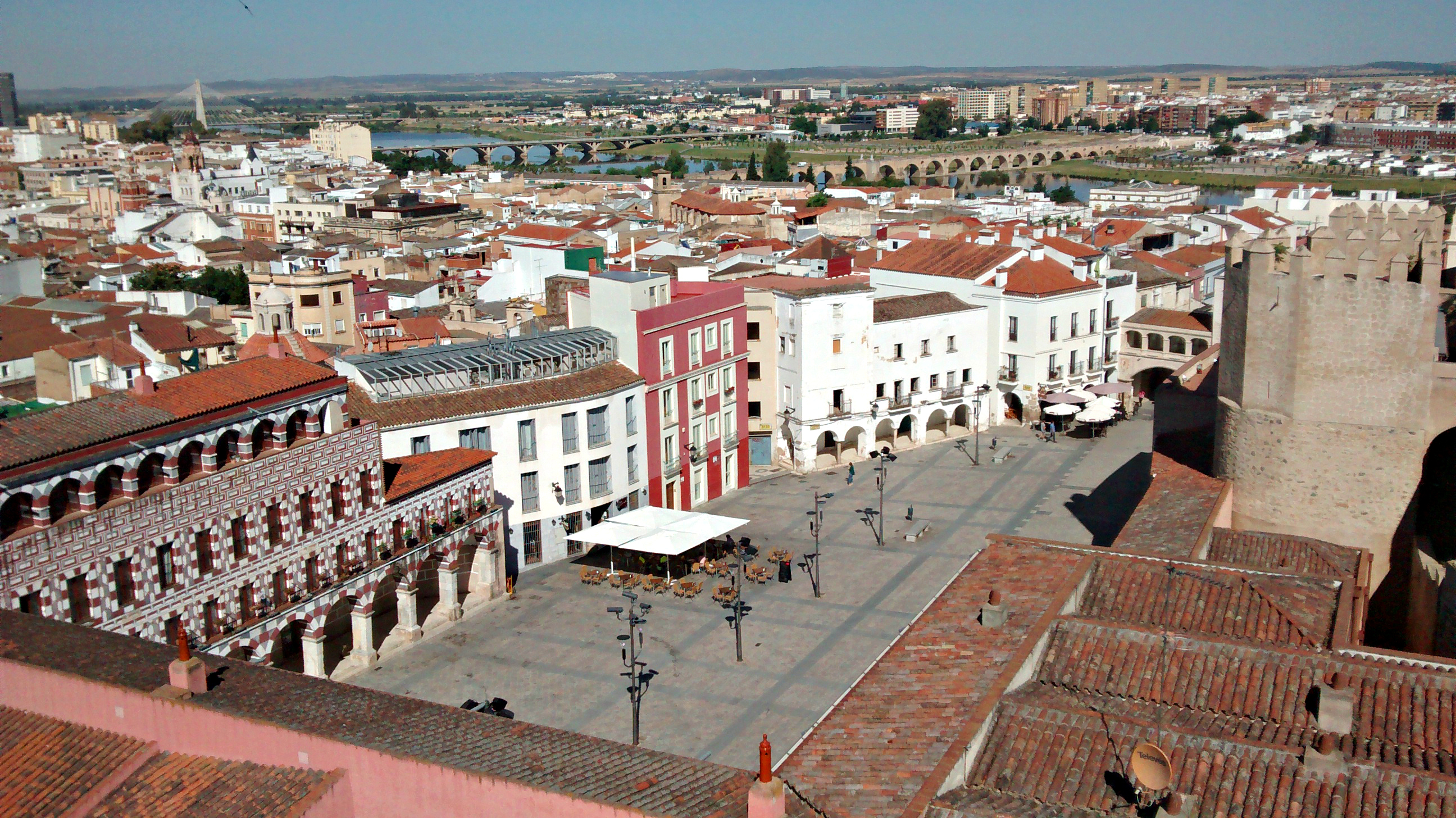 Vista de Badajoz desde la Torre de Espantaperros. En primer término se ve la Plaza Alta y a la derecha parte de las murallas de la alcazaba.